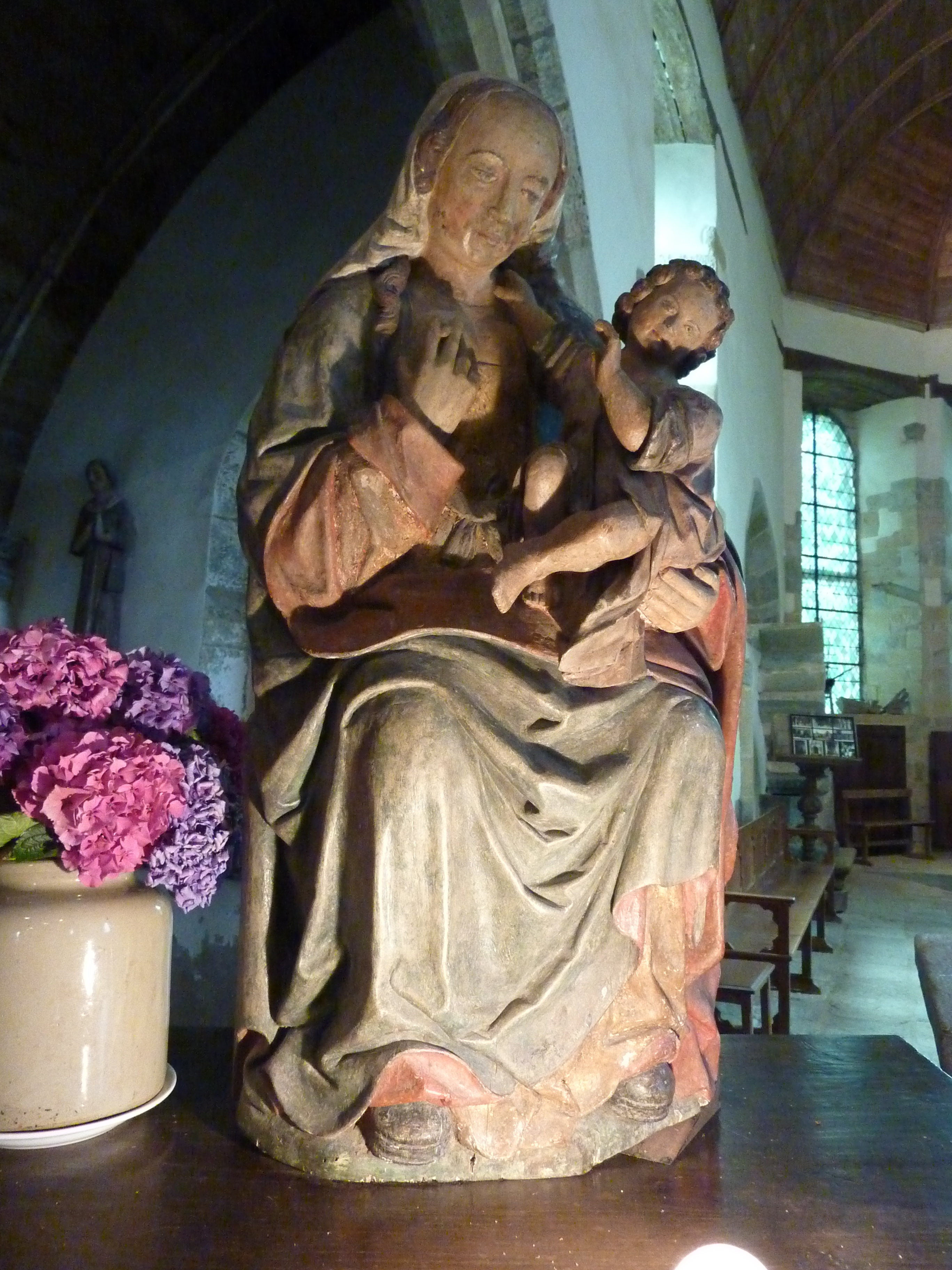 Plouha, chapelle de Kermaria-an-Iskuit, Vierge à l'Enfant